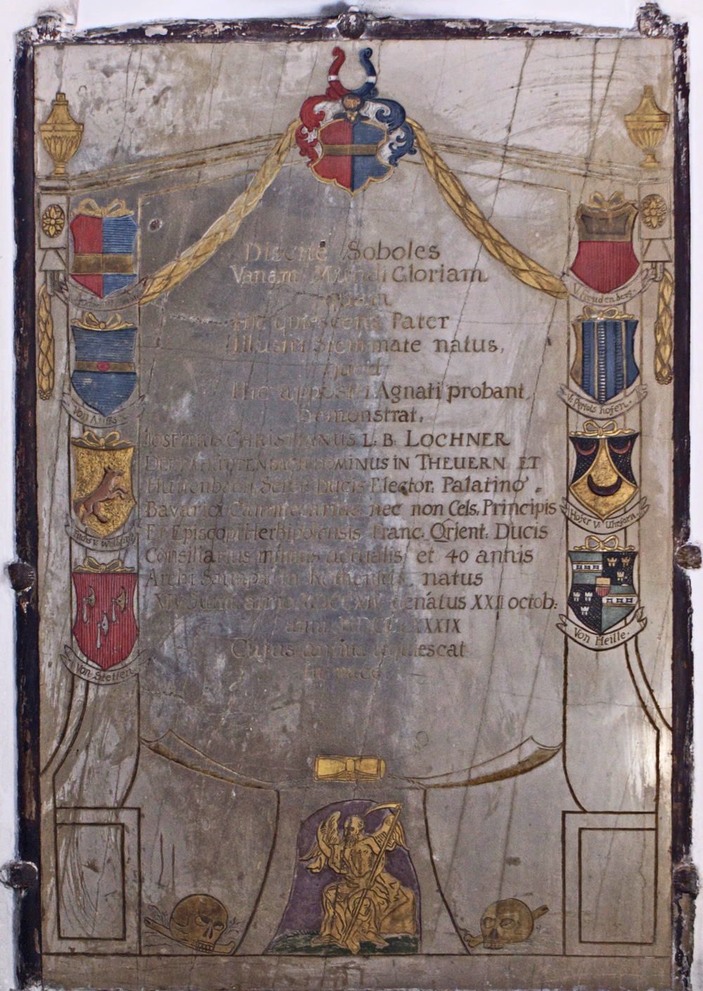 Epitaph des Christian Lochner in der ehemaligen Schlosskirche in Theuern